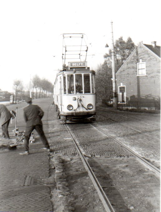 Buitenlijnmotorwagen 58 van de lijn Den Haag - Delft te Rijswijk 's gravenmade, september 1964